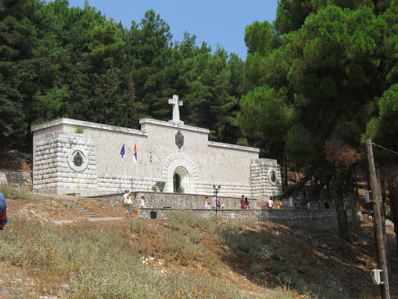 Аутор: Корисник:SmirnofLeary, август 2009. године. Маузолеј, на острву Видо поред острва Крф.